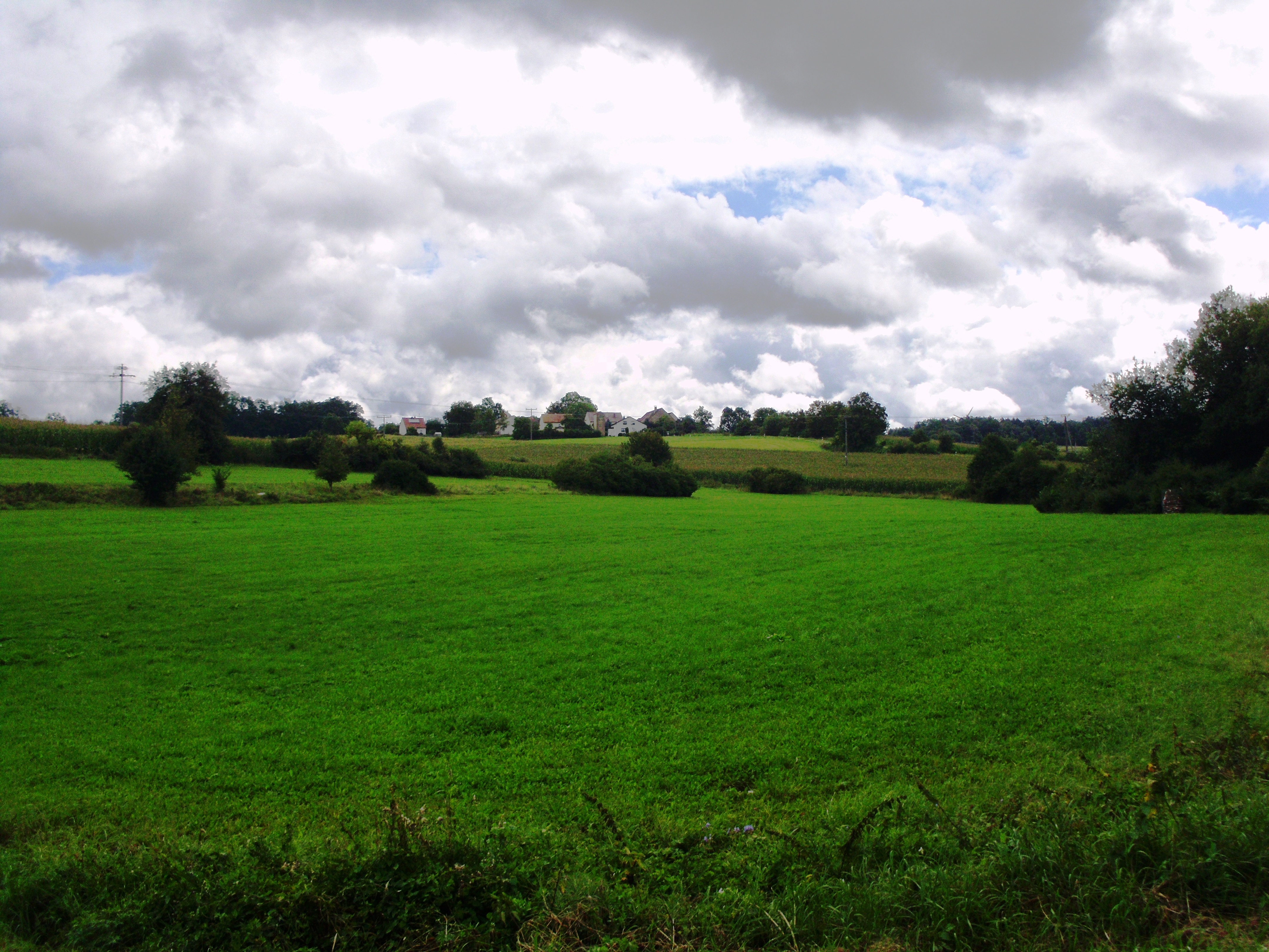 Neufang, Ortsteil von Treuchtlingen im Landkreis Weißenburg-Gunzenhausen